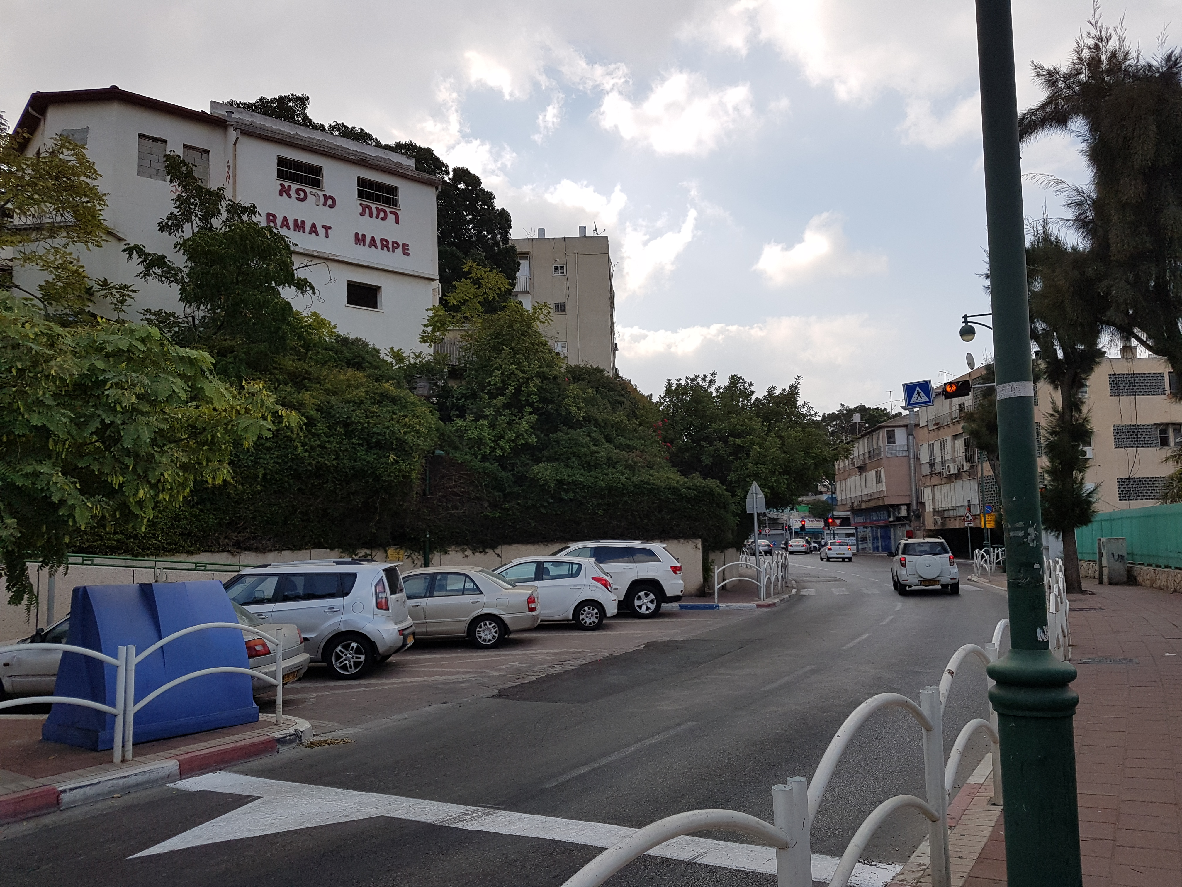 בית חולים רמת מרפא התקווה 23 רמת גן. צילום לכיוון רח' ז'בוטינסקי